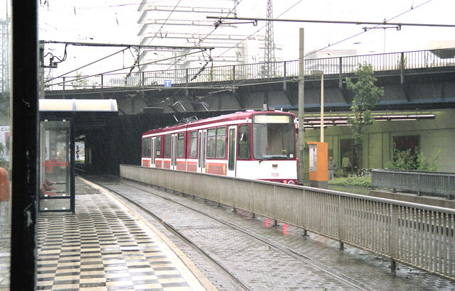 Tram at Duisburg Hbf